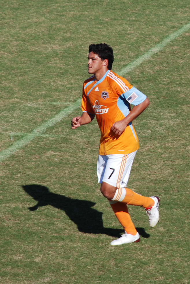 At home against LA